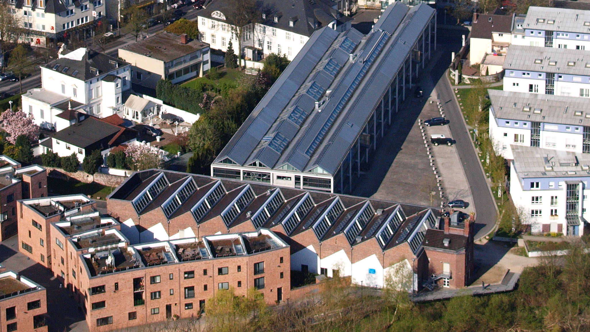 Chronoswerk, Frankfurter Straße, Hennef (Sieg): Luftaufnahme